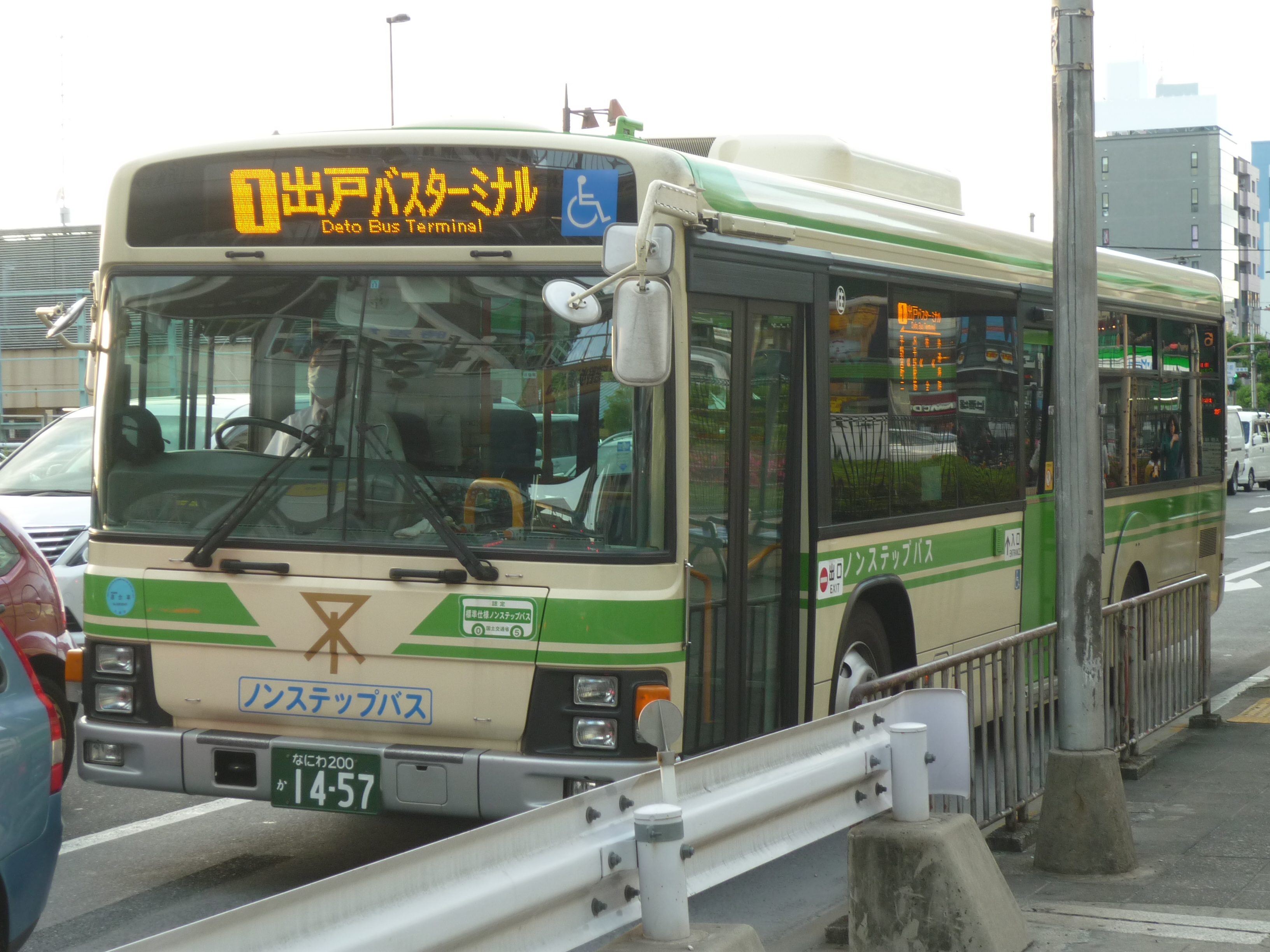 大阪市営バス住吉営業所所属車両